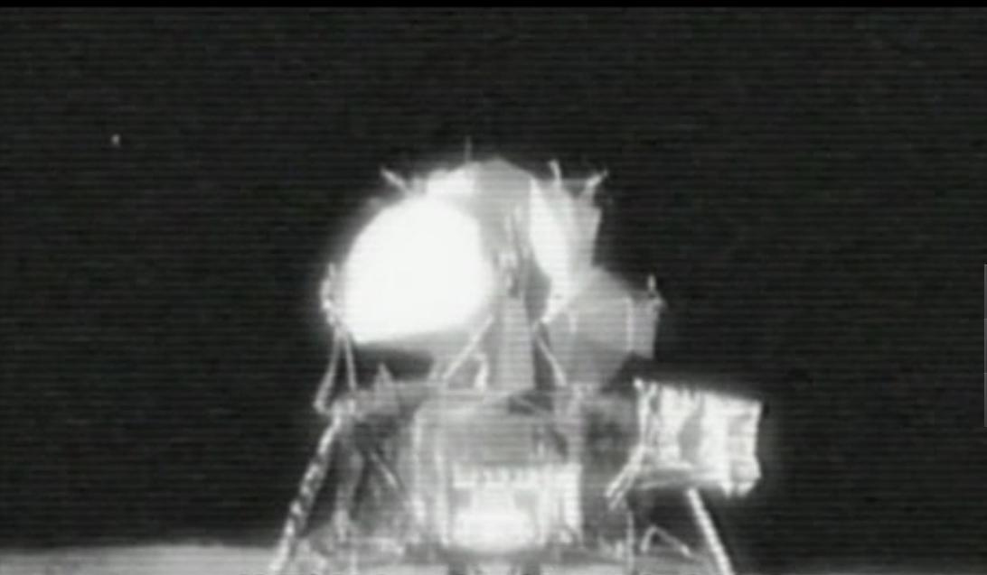 阿姆斯特朗和奥尔德林登月之际，苏联的探测飞船飞过着陆点。